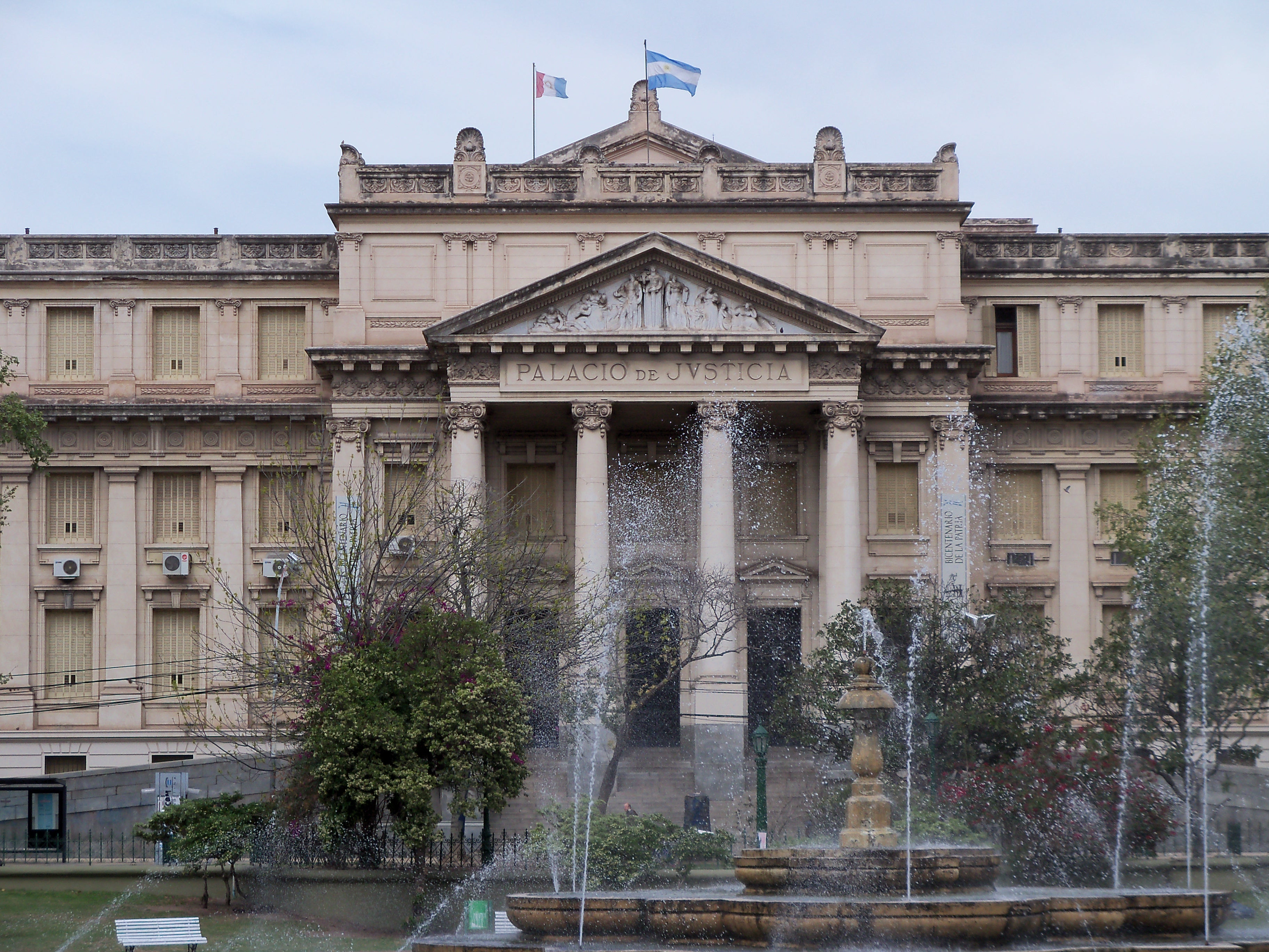 Palacio de Justicia de Córdoba,vista detrás de la fuente del Paseo de Sobremonte...